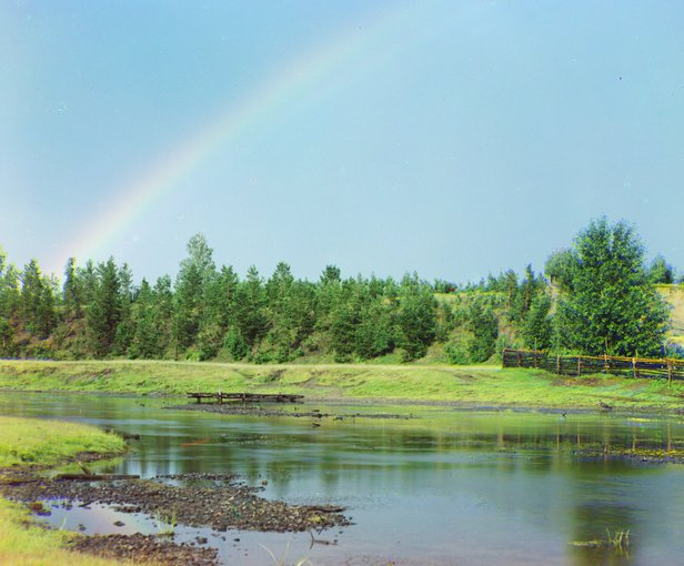 Sabirabad (Petropavlovka).